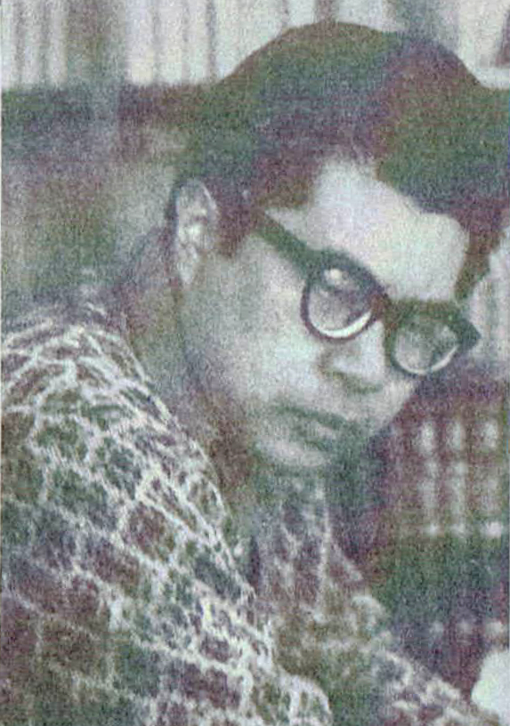 婦人生活社『婦人生活』第14巻第4号（1960）より菊村到